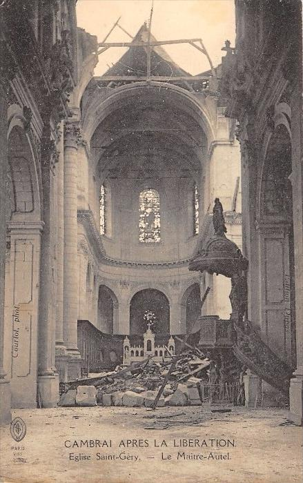 L'église Saint-Géry de Cambrai endommagée à la Libération.